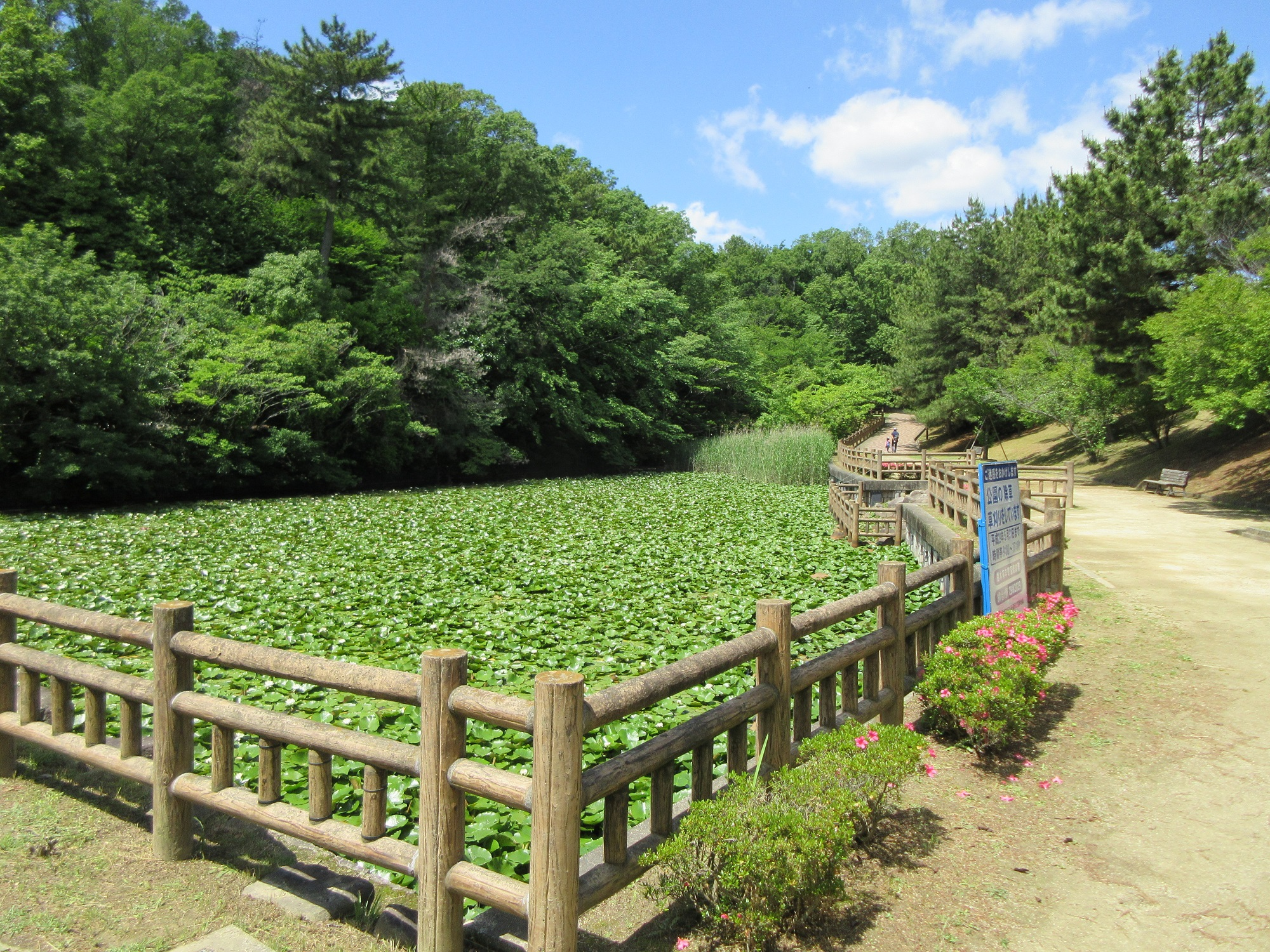 竜美ヶ丘公園（岡崎市竜美東）